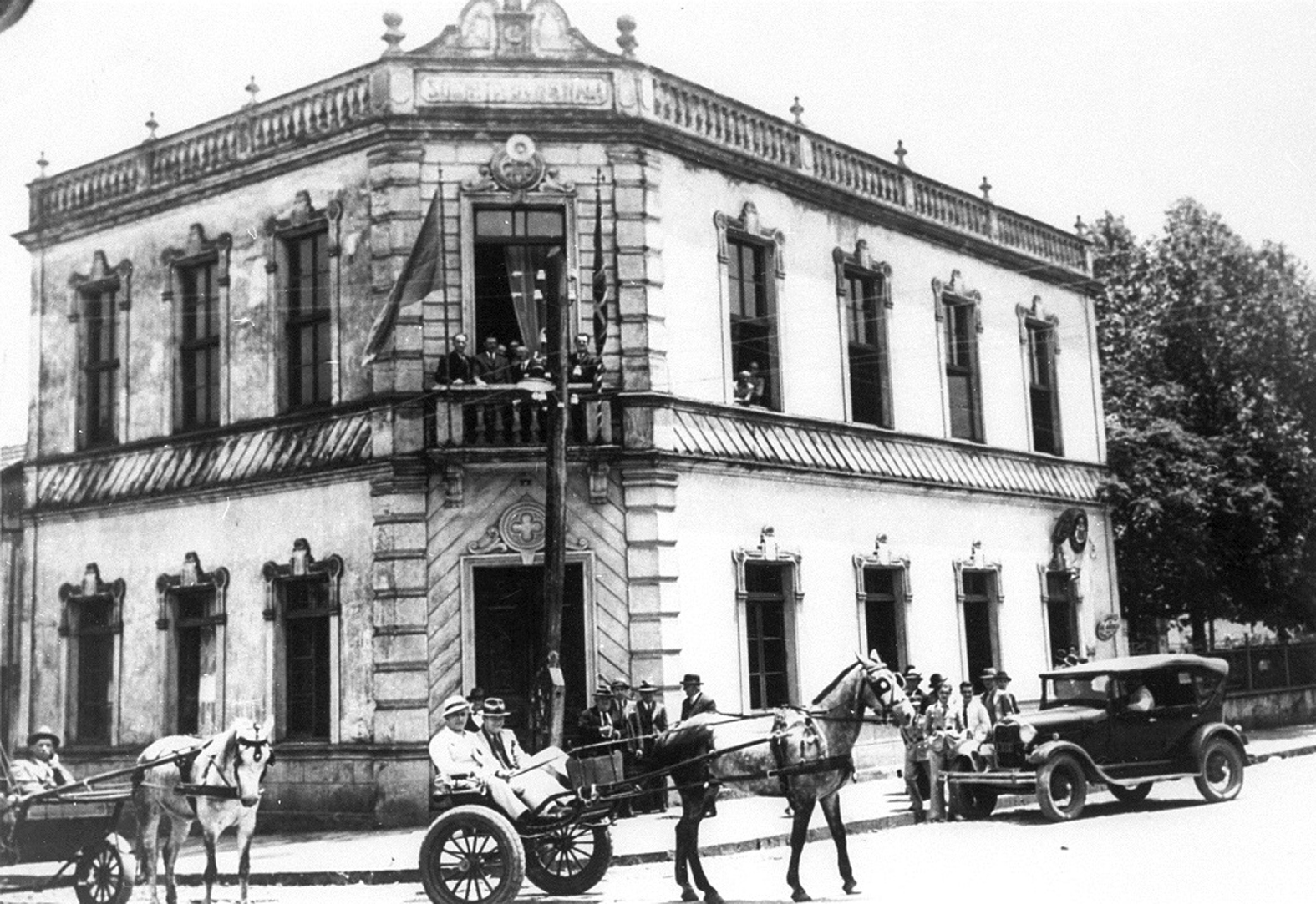 Sede da Sociedade Príncipe de Nápoles.